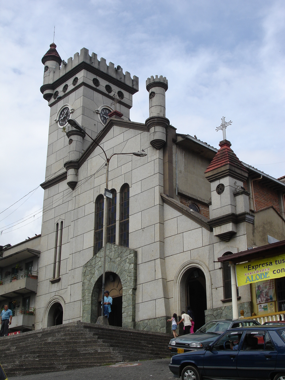 Iglesia de San Antonio en el corregimiento de San Antonio de Prado, Medellín, Colombia.